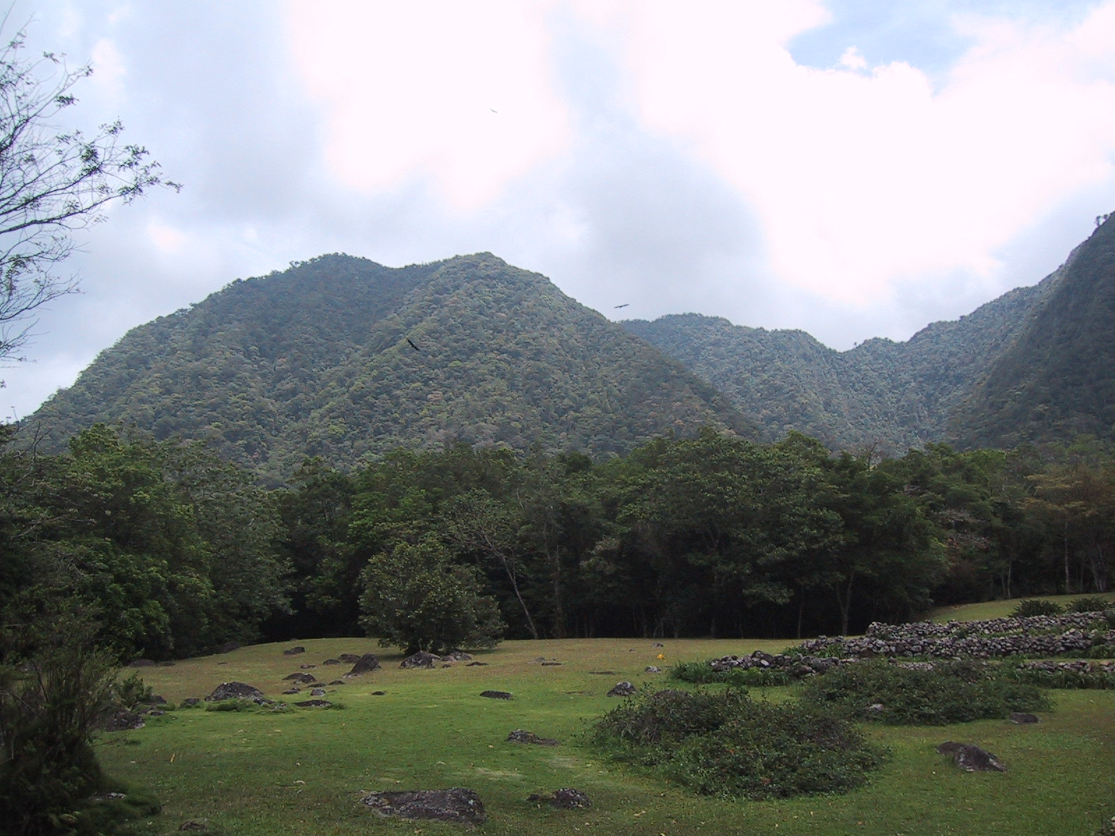 Panama